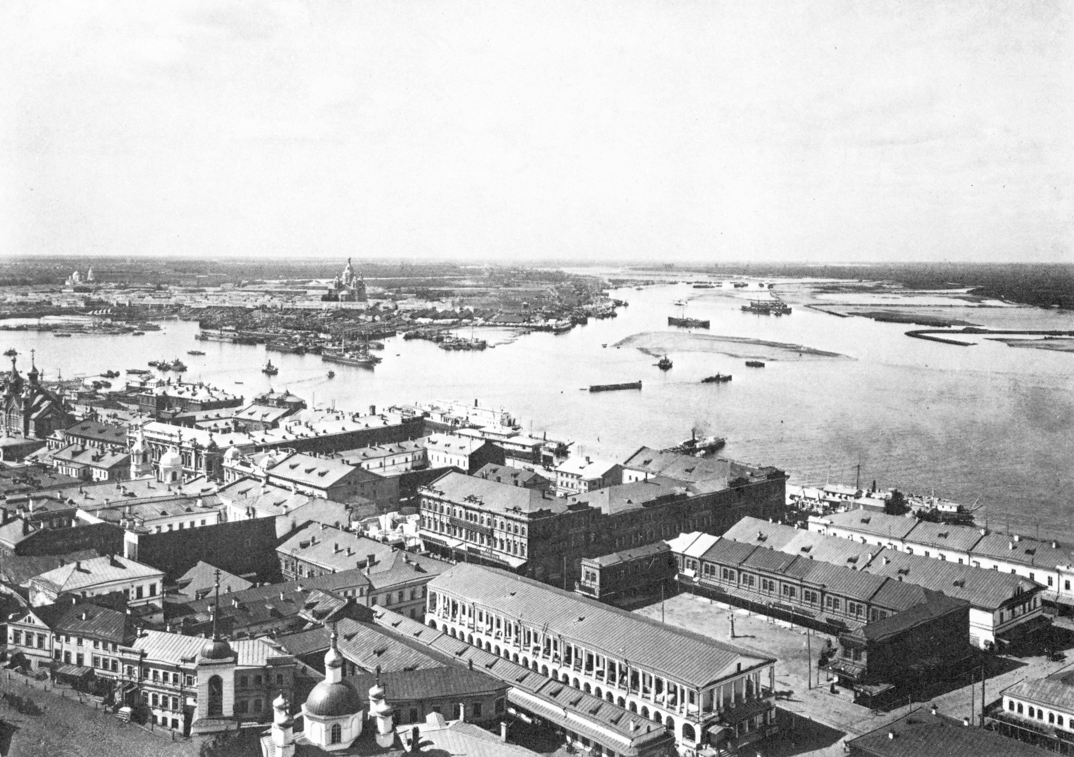 Вид на слияние Оки и Волги и Нижний базар